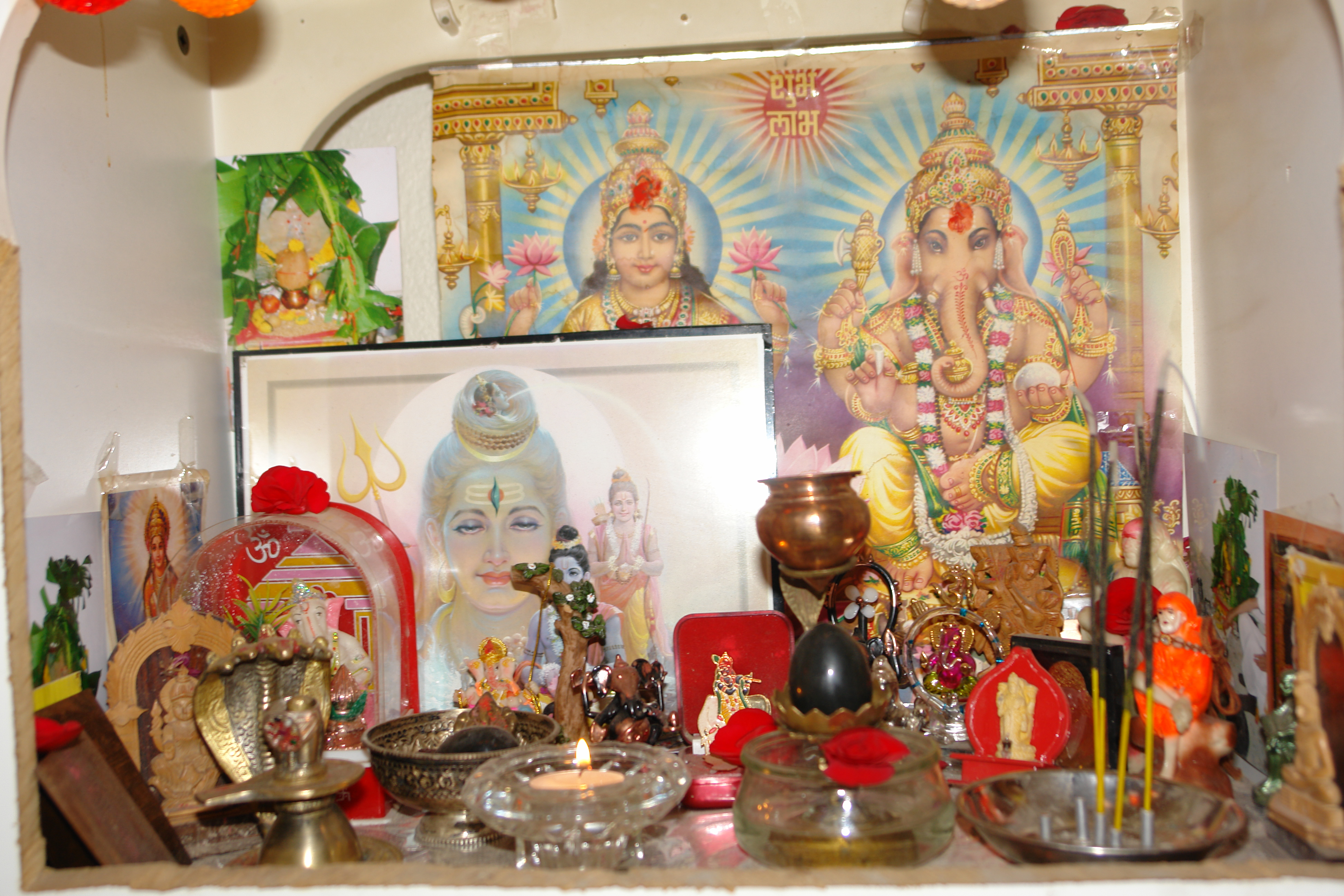 Hindu home temple